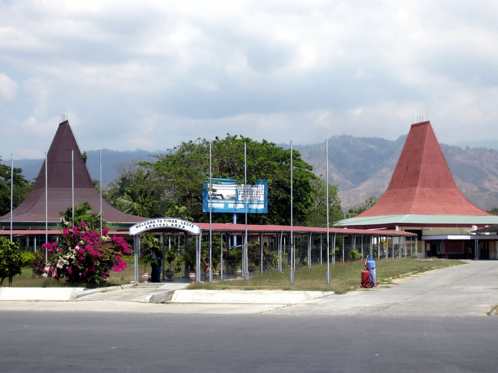 Presidente Nicolau Lobato International Airport, Dili, Timor-Leste